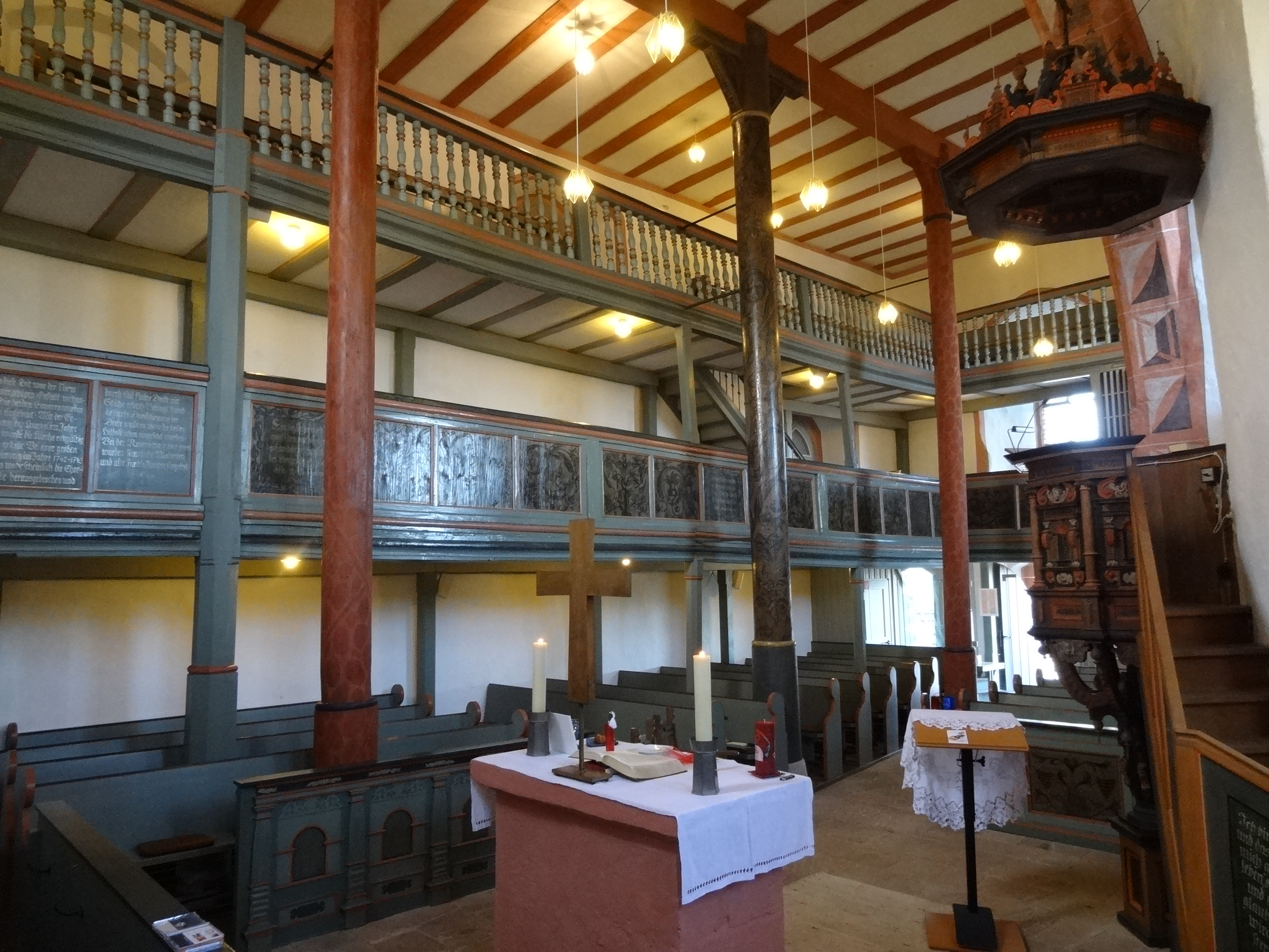 Evangelische Katharinenkirche Gleiberg